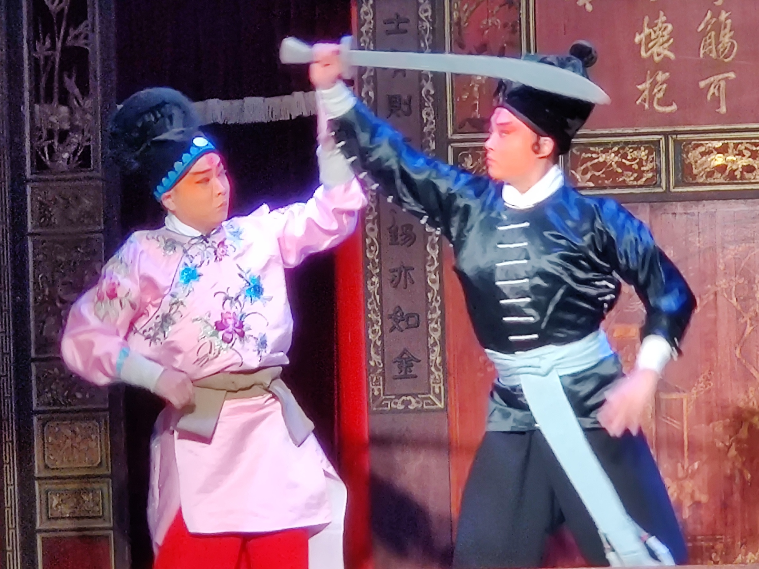 中文（中国大陆）: 武松——王政。西门庆——石志远